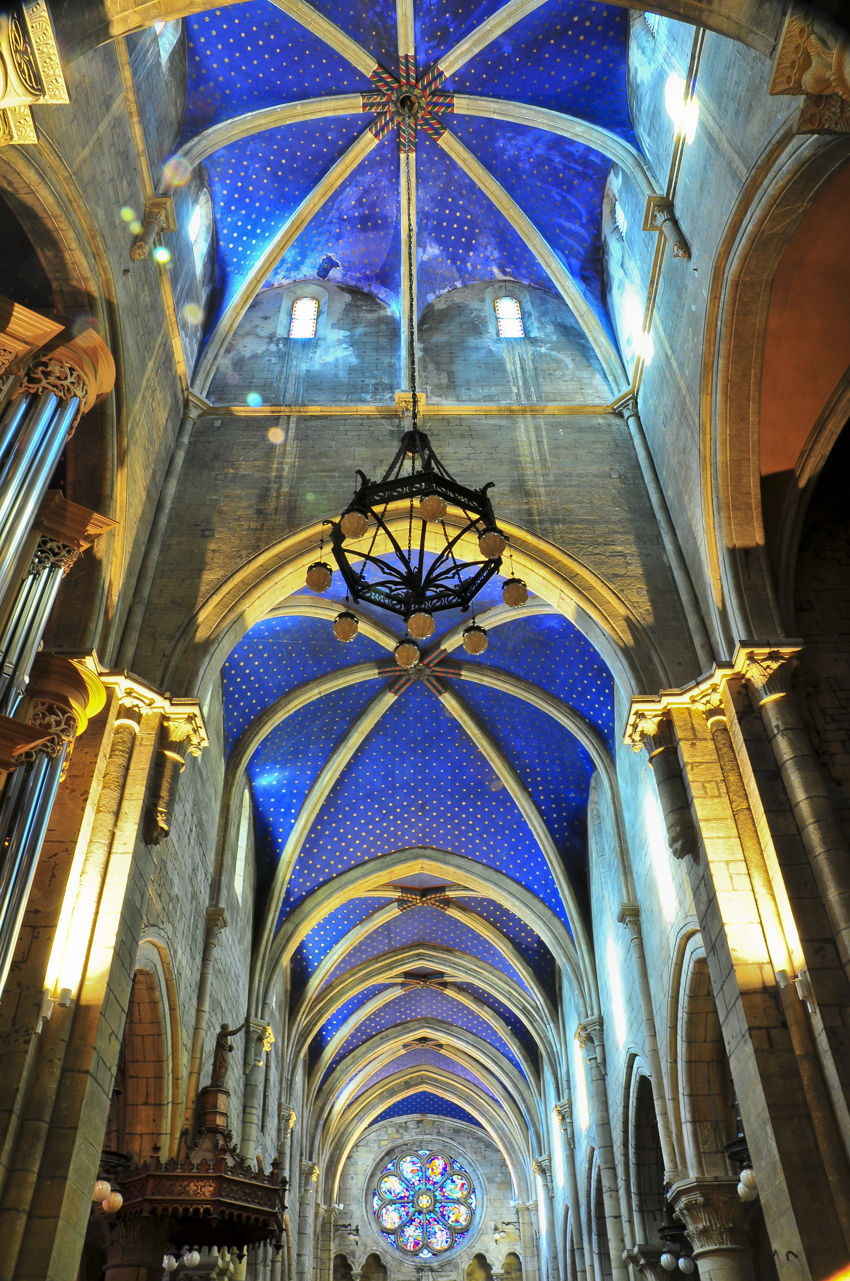 Neuchâtel, Collégiale de Neuchâtel